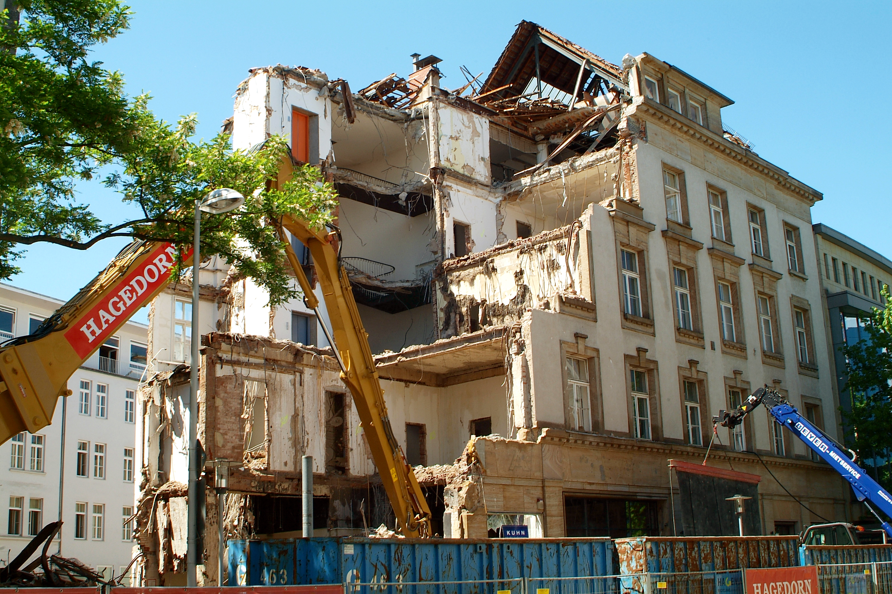 Das ehemalige Verwaltungsgebäude der Gaswerke von Hannover, Osterstraße 31 (eine Hausnummer 29 war bisher nicht vorhanden) war eines der letzten erhaltenen Gebäude in der Innenstadt von Hannover, die die Luftangriffe auf Hannover im Zweiten Weltkrieg überstanden hatten. Das von dem Architekten Wilhelm Mackensen errichtete Gebäude weicht einem Neubaukomplex des Berliner Architekturbüros Kleihues + Kleihues (das auch die Gestaltung des neuen Kröpcke-Centers verantwortet) für die Deutsche Hypo, einer Tochter der Nord-LB.